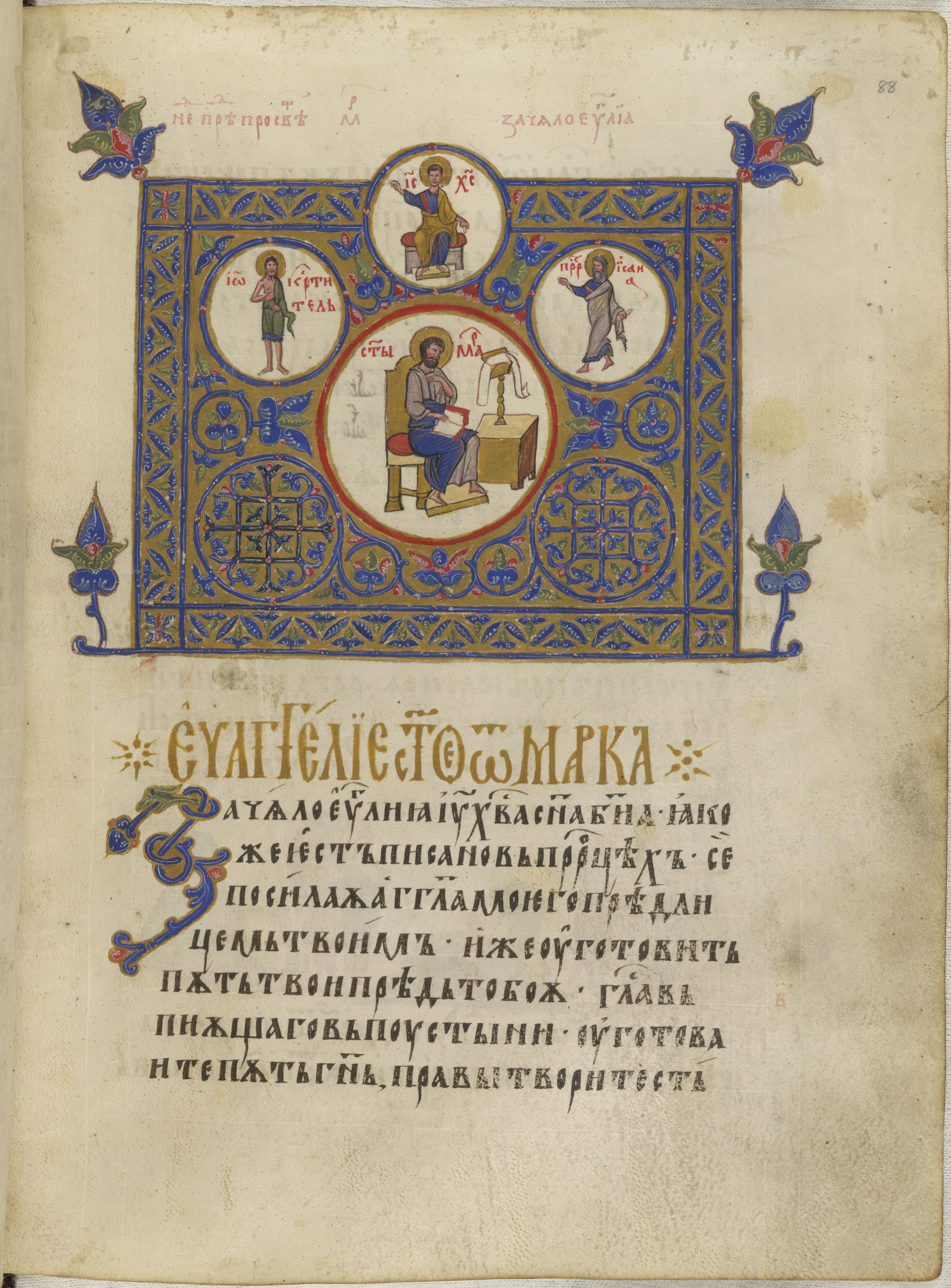 Четвероевангелие на цар Иван Александър, Евангелие от Марк, лист 88, дясно